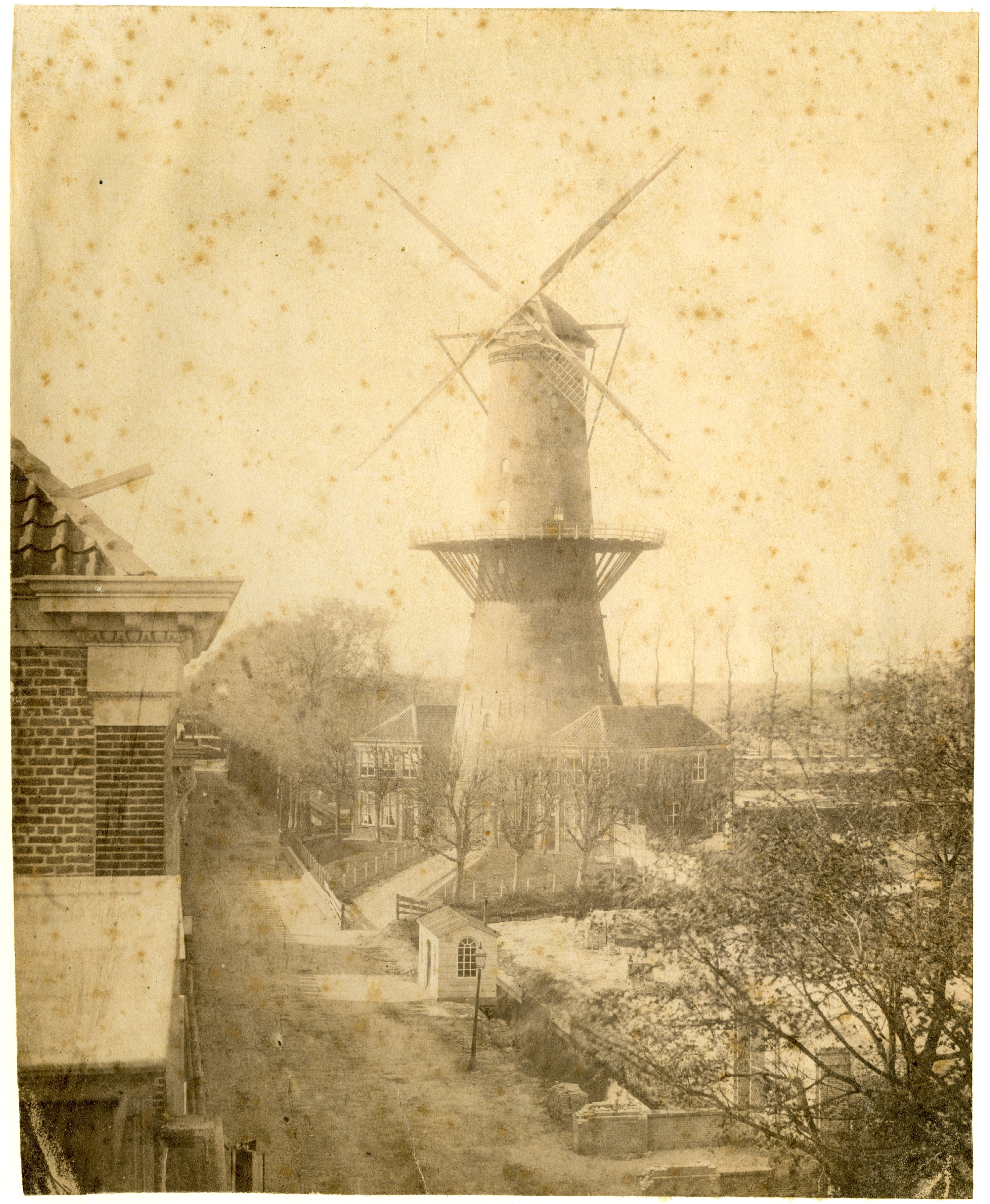 Noord(er)molen, Zeestraat, Den Haag